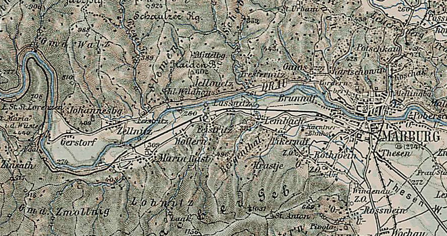 Die Ortschaft Lassnitz bei Marburg Ende 19. Jh.